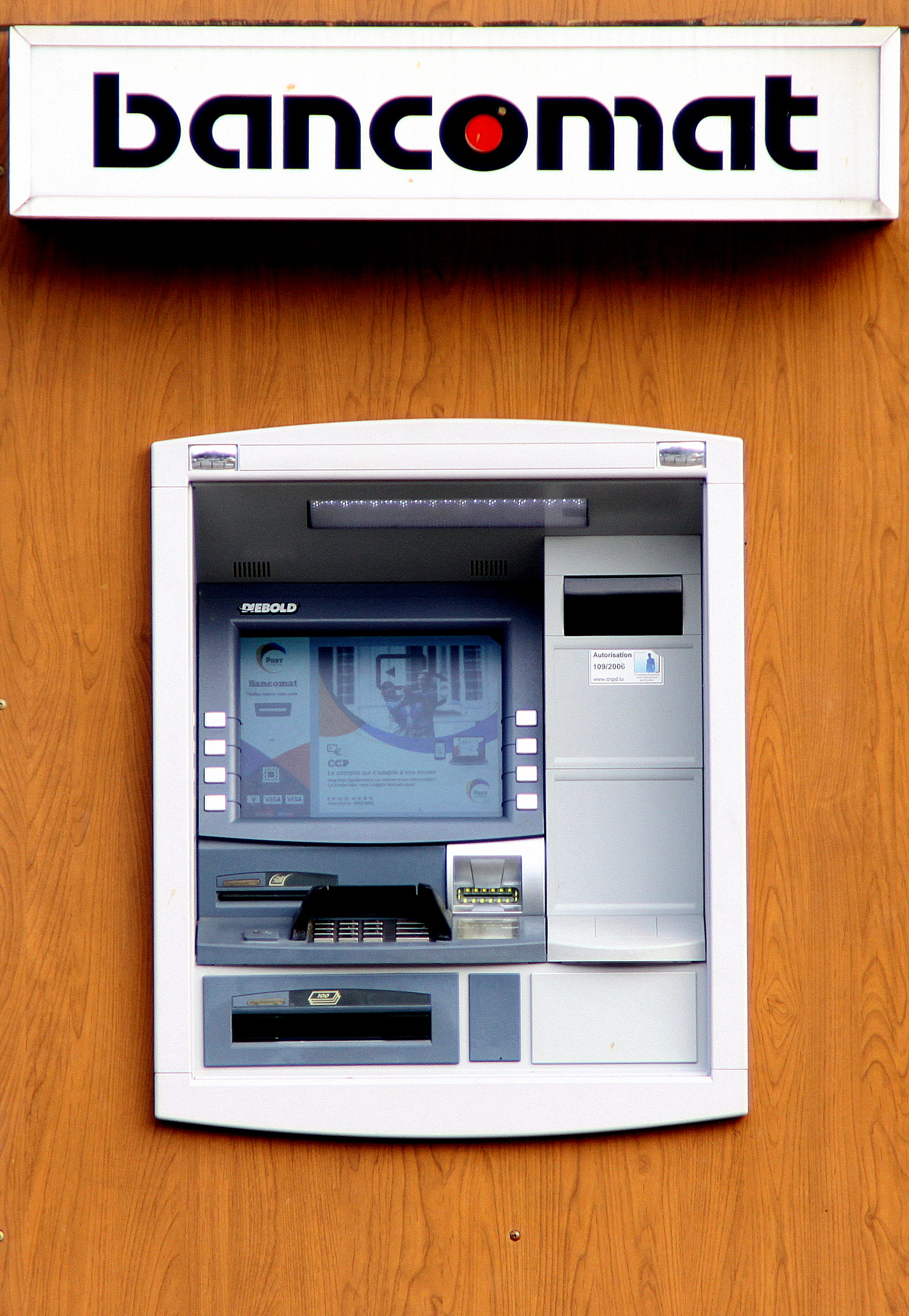 E Bancomat